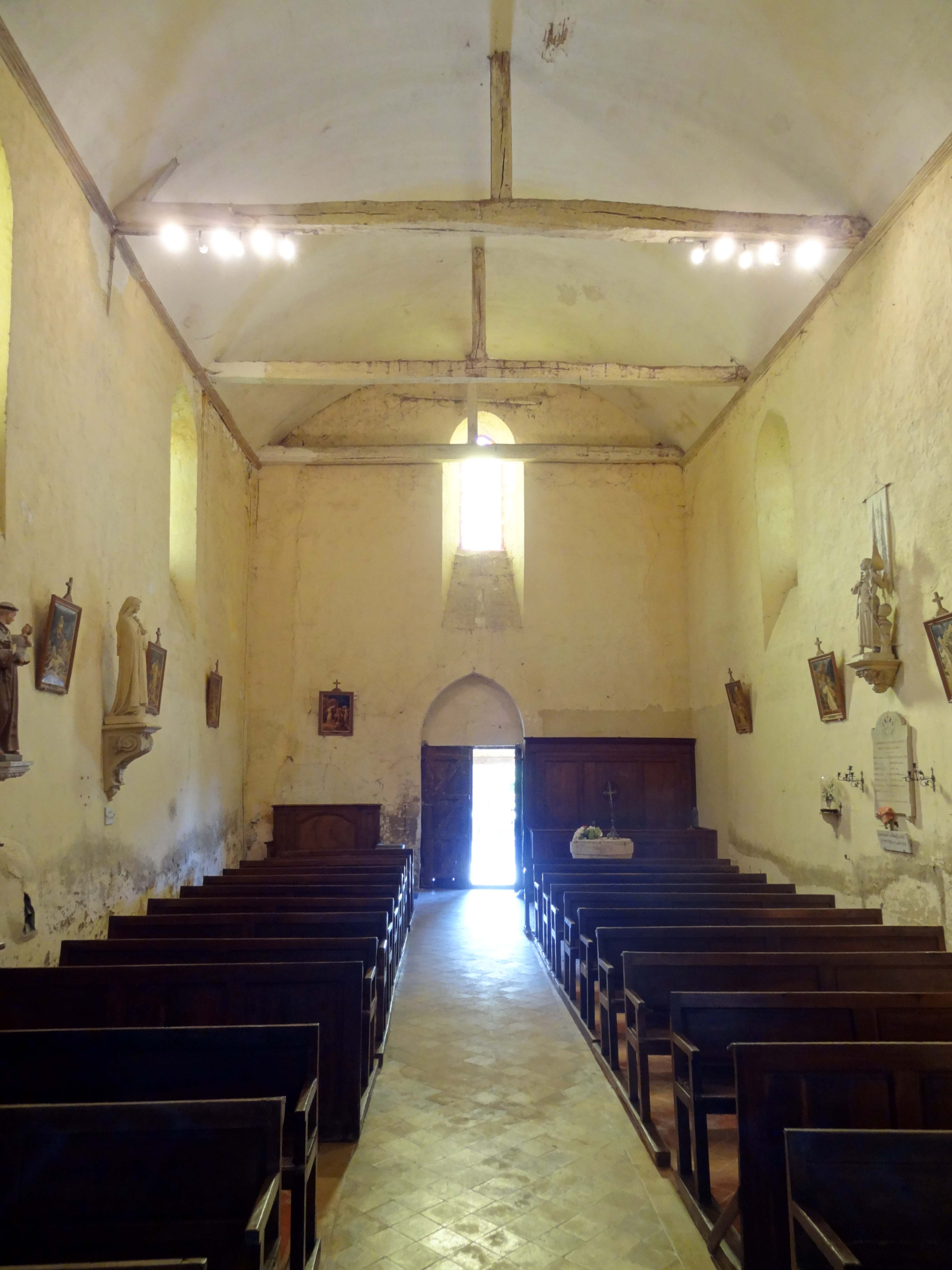 Intérieur de l'église - voir titre.